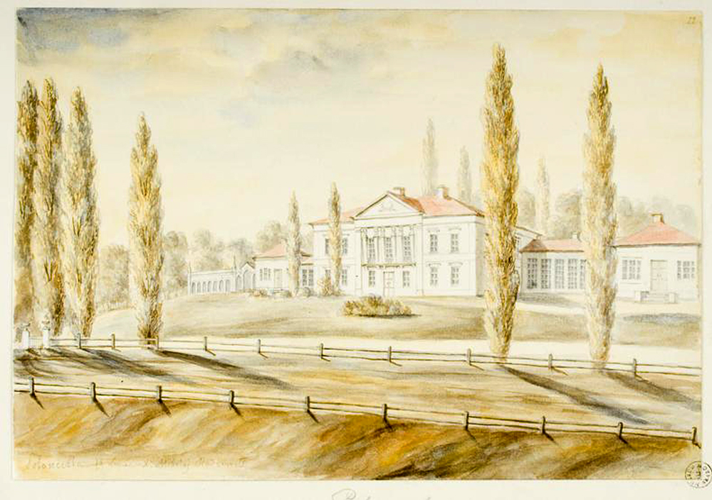 Беларуская (тарашкевіца): Паланэчка (Pałanečka), сядзіба Радзівілаў (Radzivił)